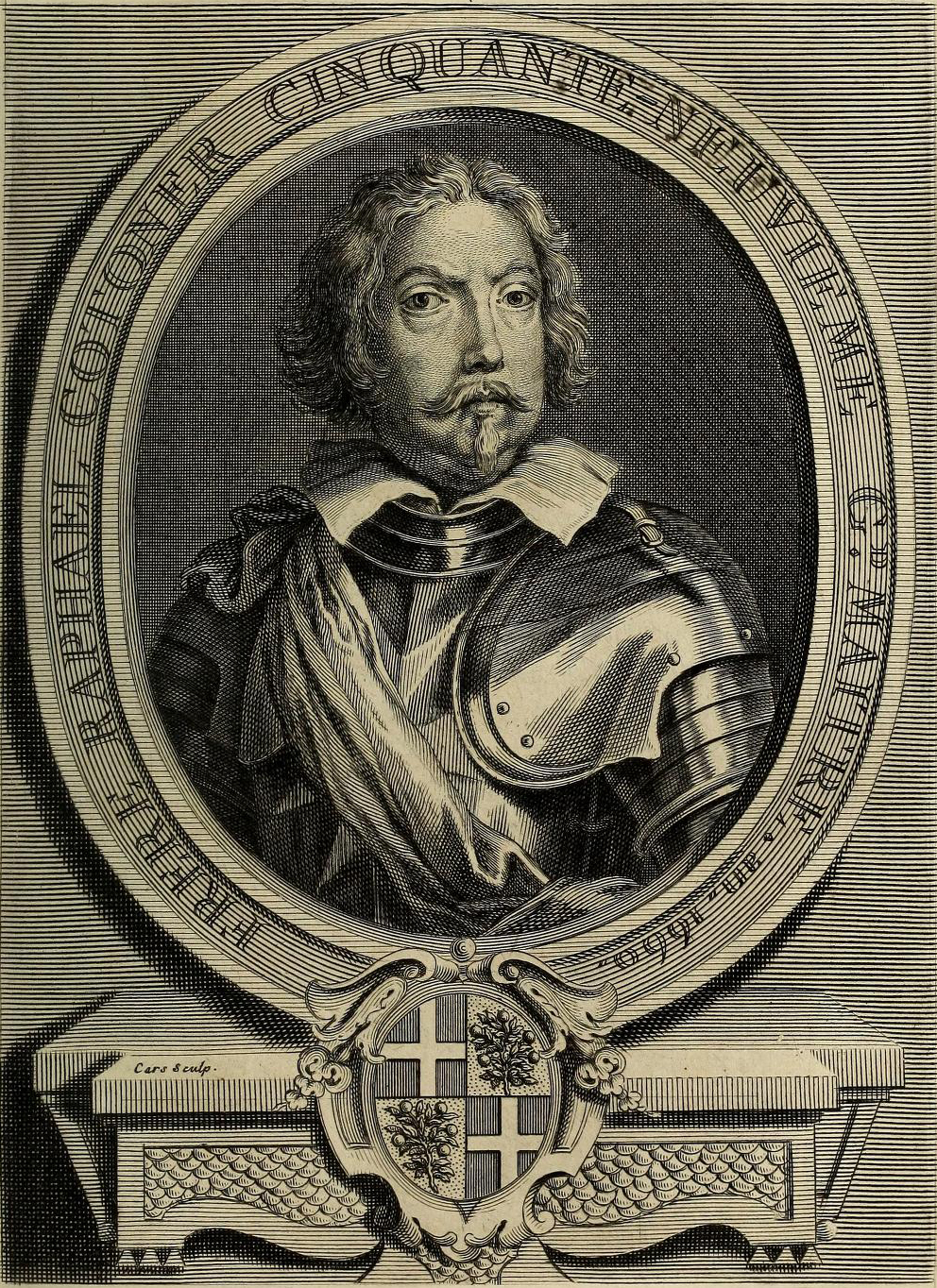 Grand maître de l'Ordre